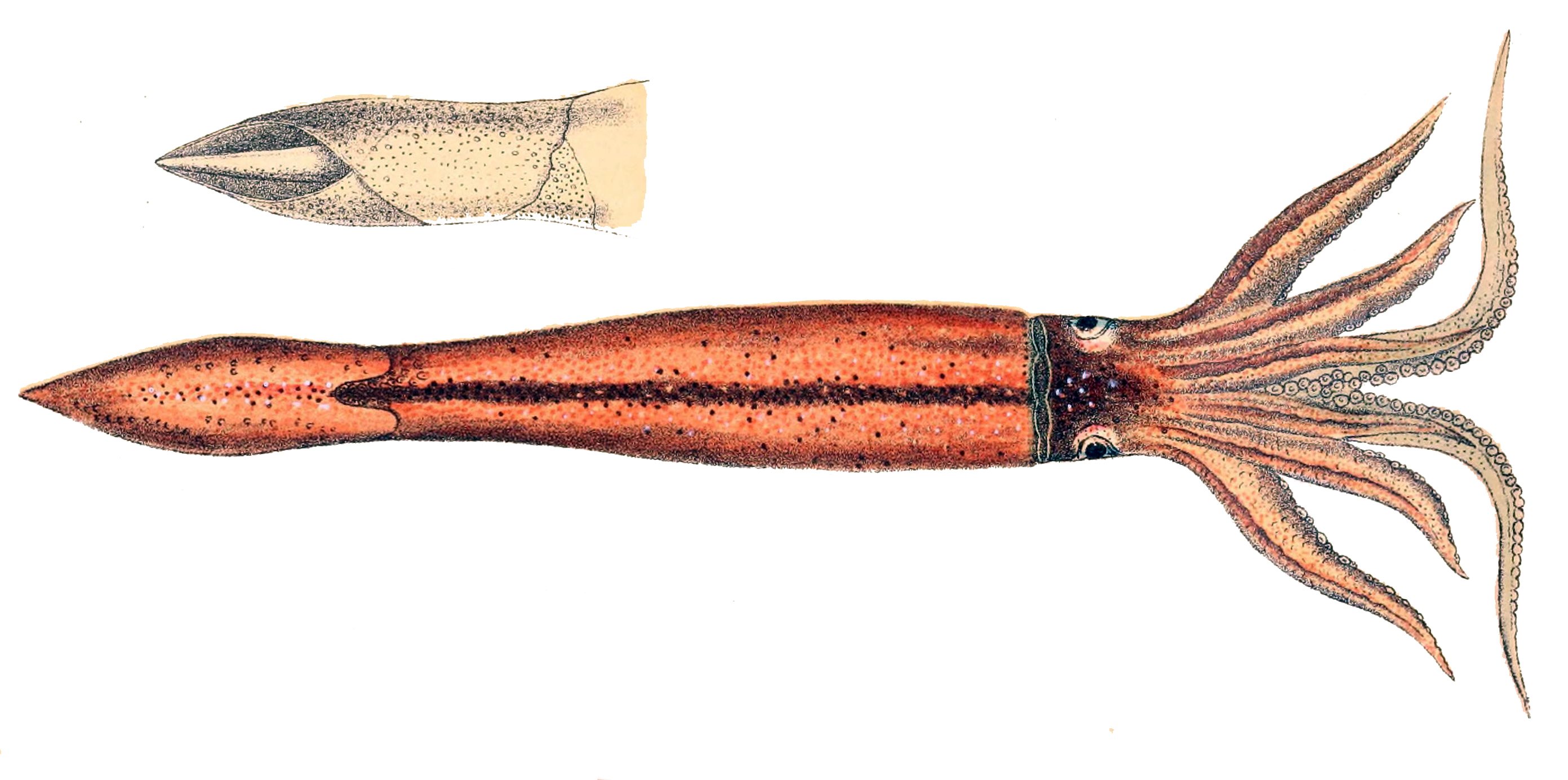 Taonius pavo